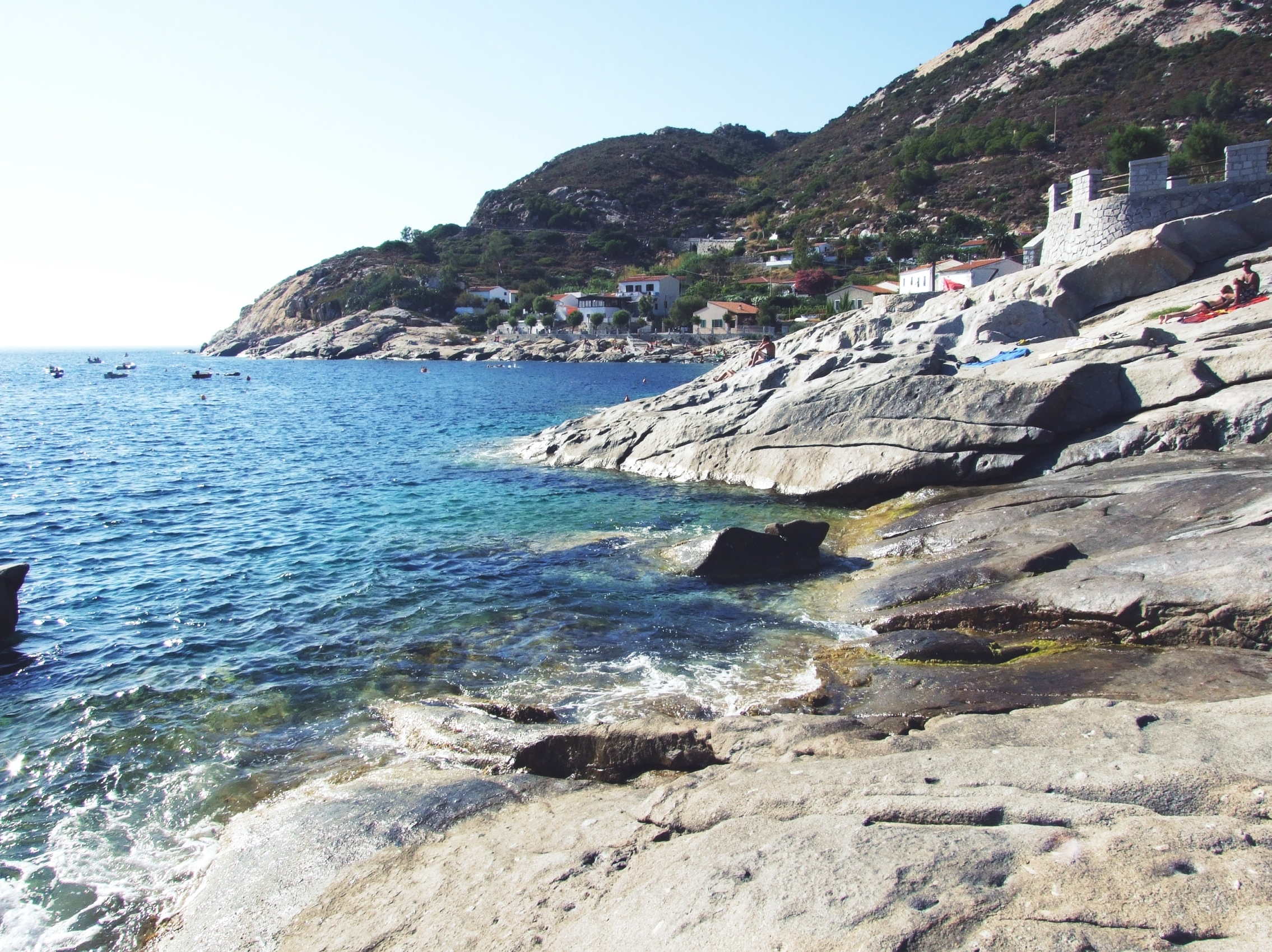 Chiessi beach — Elba.